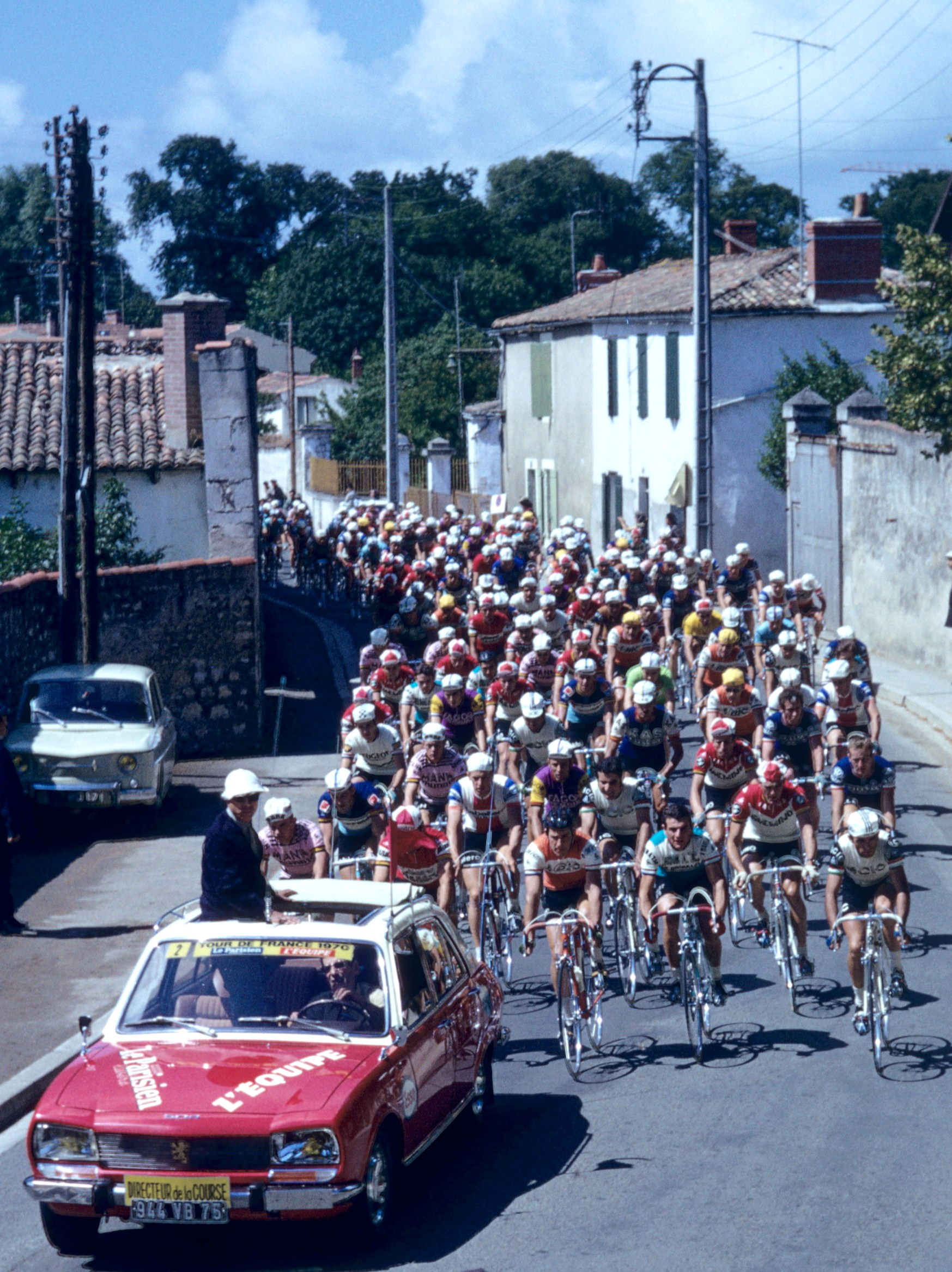 Tour de France cycliste 1970, seconde étape La Rochelle-Angers. Juste après le départ, les coureurs cyclistes passent rue Marius Lacroix en face du n° 51. Au premier plan on aperçoit la moto du journal télévisé qui est suivie par la voiture du directeur du Tour précédant les coureurs. Dans le peloton on distingue un cycliste en maillot jaune, c' est Eddy Merckx (vainqueur de la première étape Limoges-La Rochelle). Cette photographie a été prise depuis l' étage du 51 bis. La Rochelle, Charente Maritime, France.